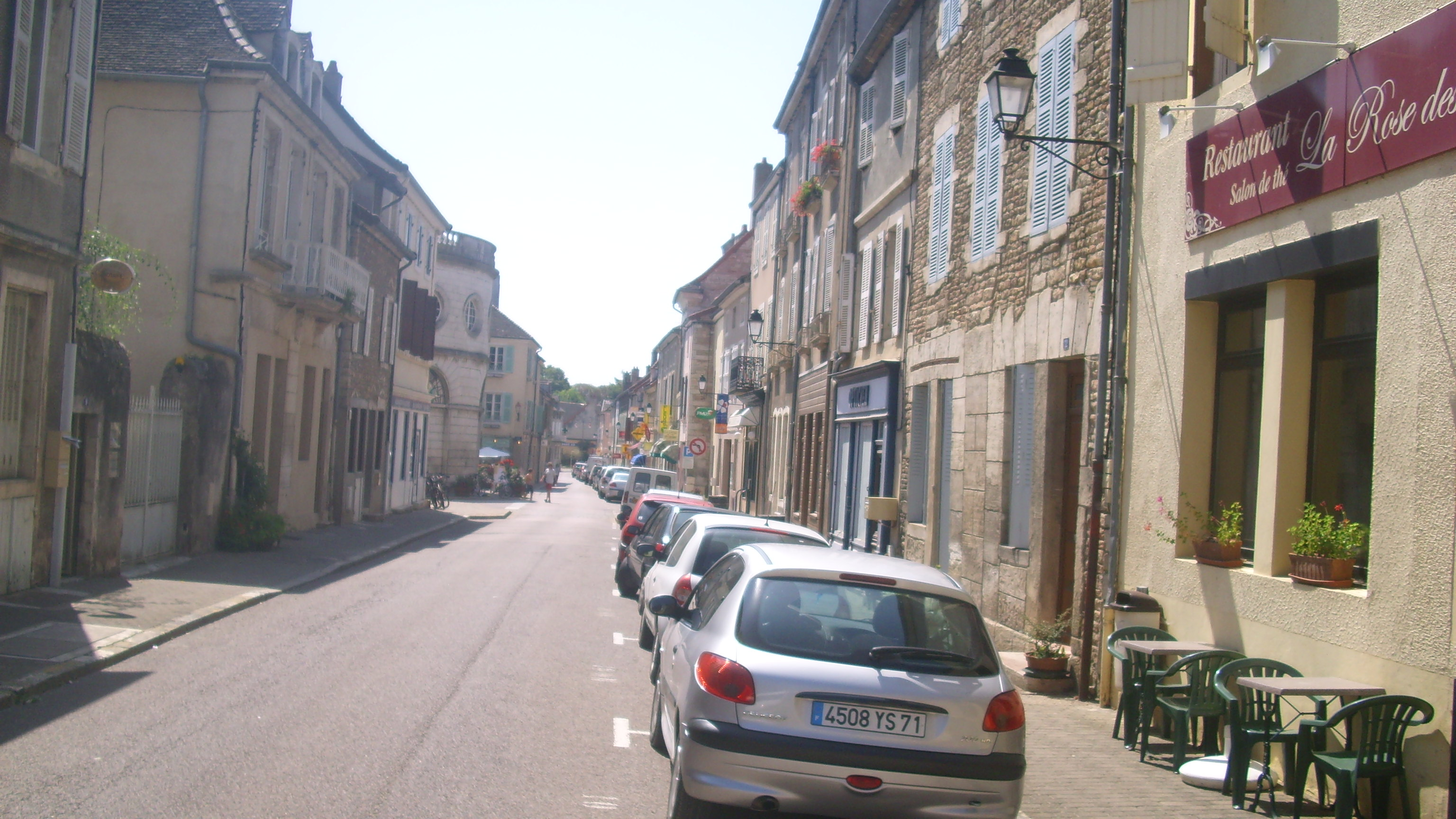 Rue principale à Givry (71)